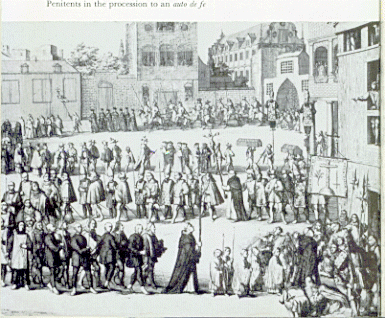 Primer Acto de fe en México